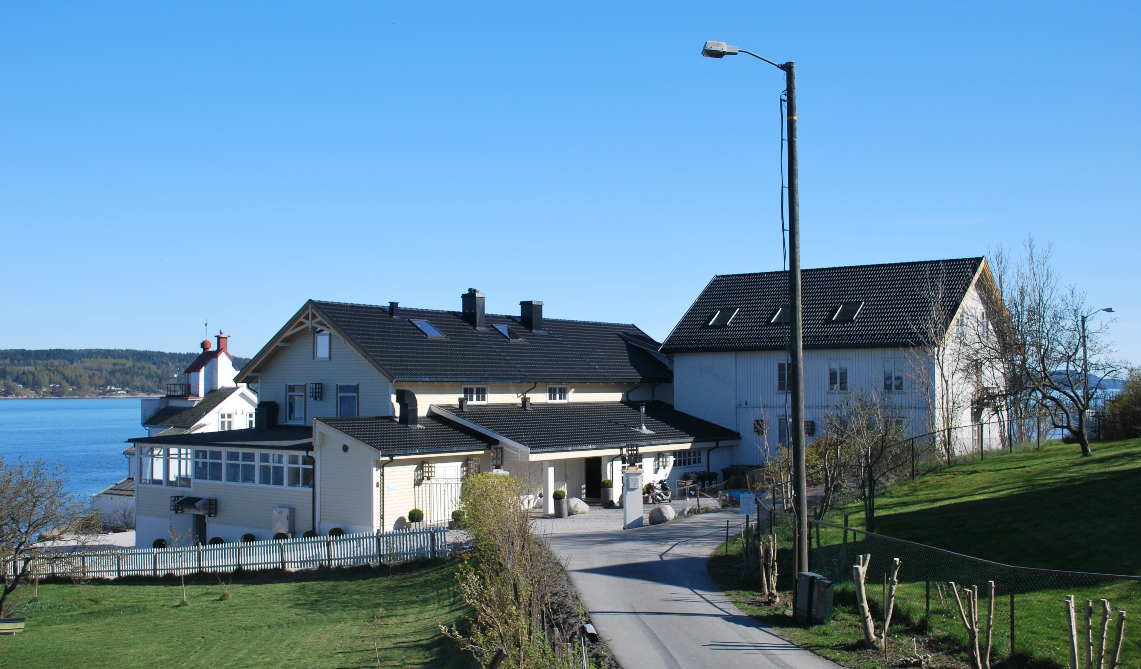 Tidligere Hurum Strandhotell ved Filtvedt fyr, Filtvedt. I dag restaurant Villamalla